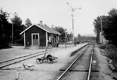 Swedish railway station Simlångsdalen, Halmstad-Bolmens Järnväg